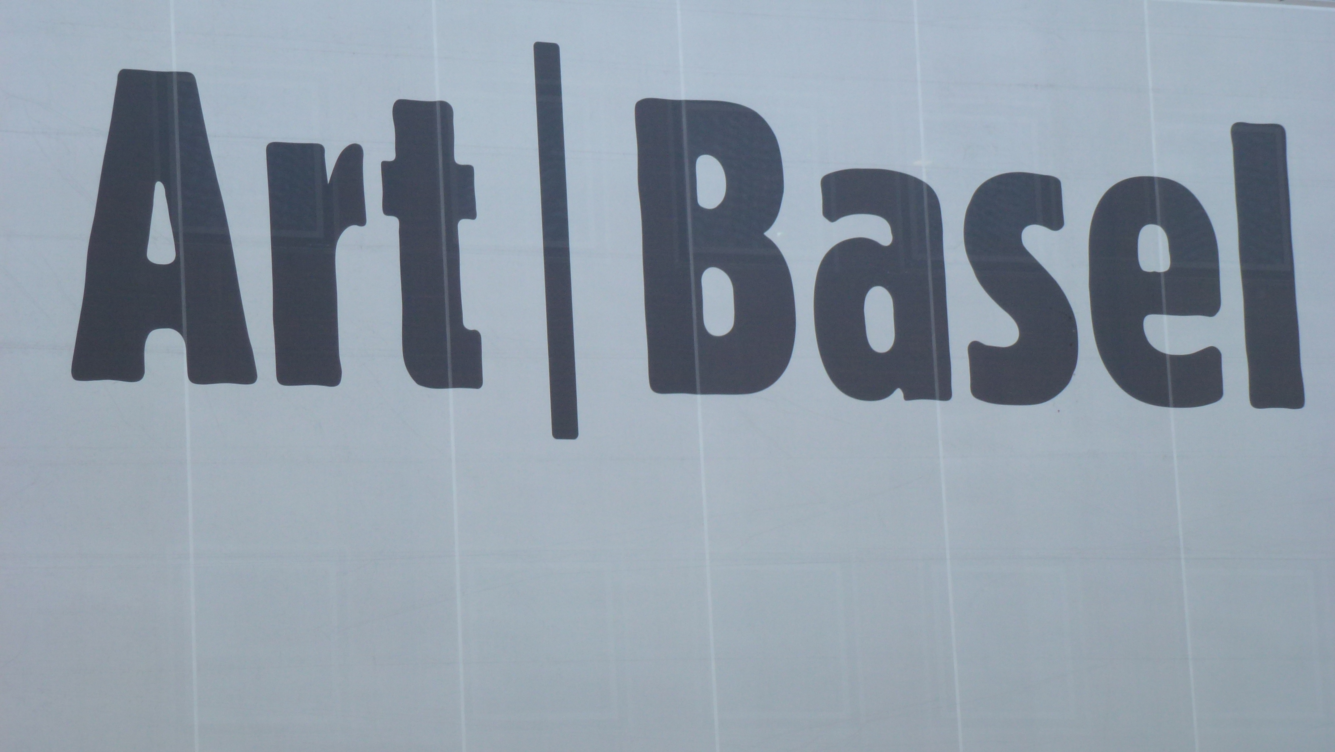 Art 42 Basel 2011